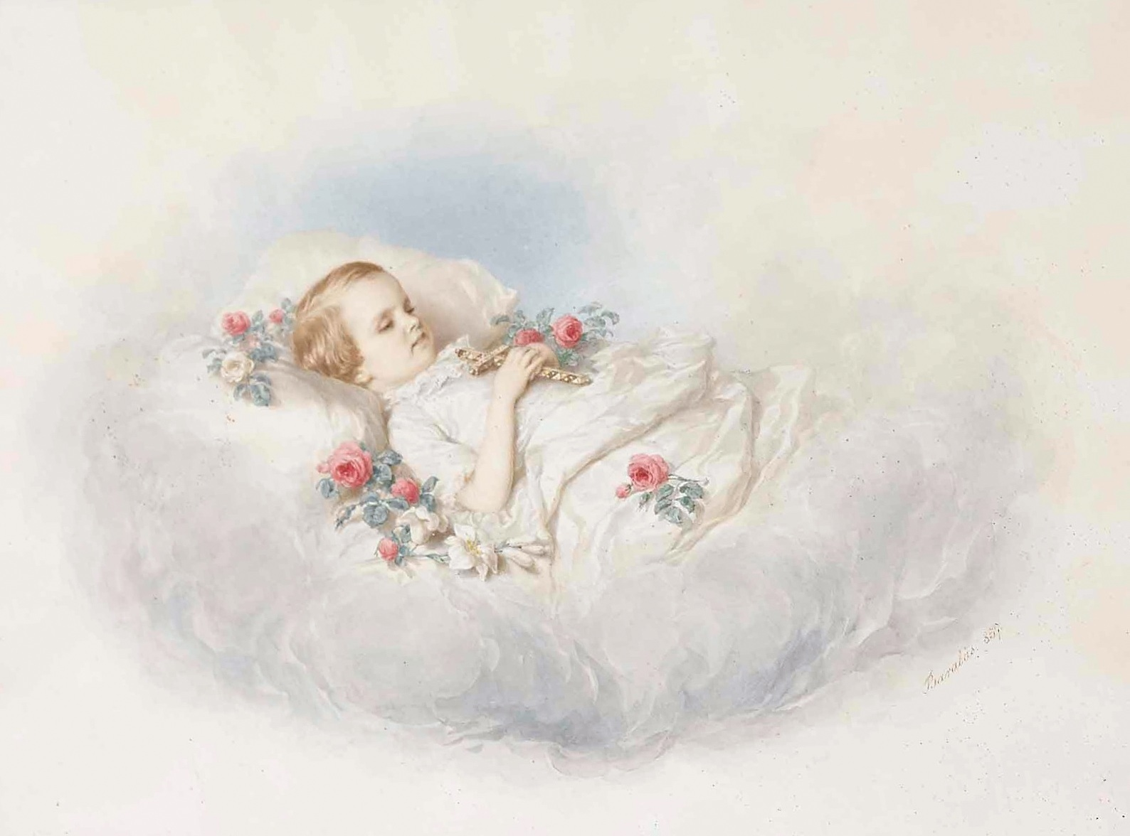 Erzherzogin Sophie von Österreich (1855-1857)